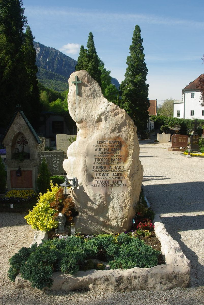 Grab der Fam. Rappel/Hartl auf dem Friedhof St. Zeno, 83435 Bad Reichenhall Urheber: Anton Schmidberger, * 11. März 1855, † 8. März 1904, Steinmetz in St. Zeno